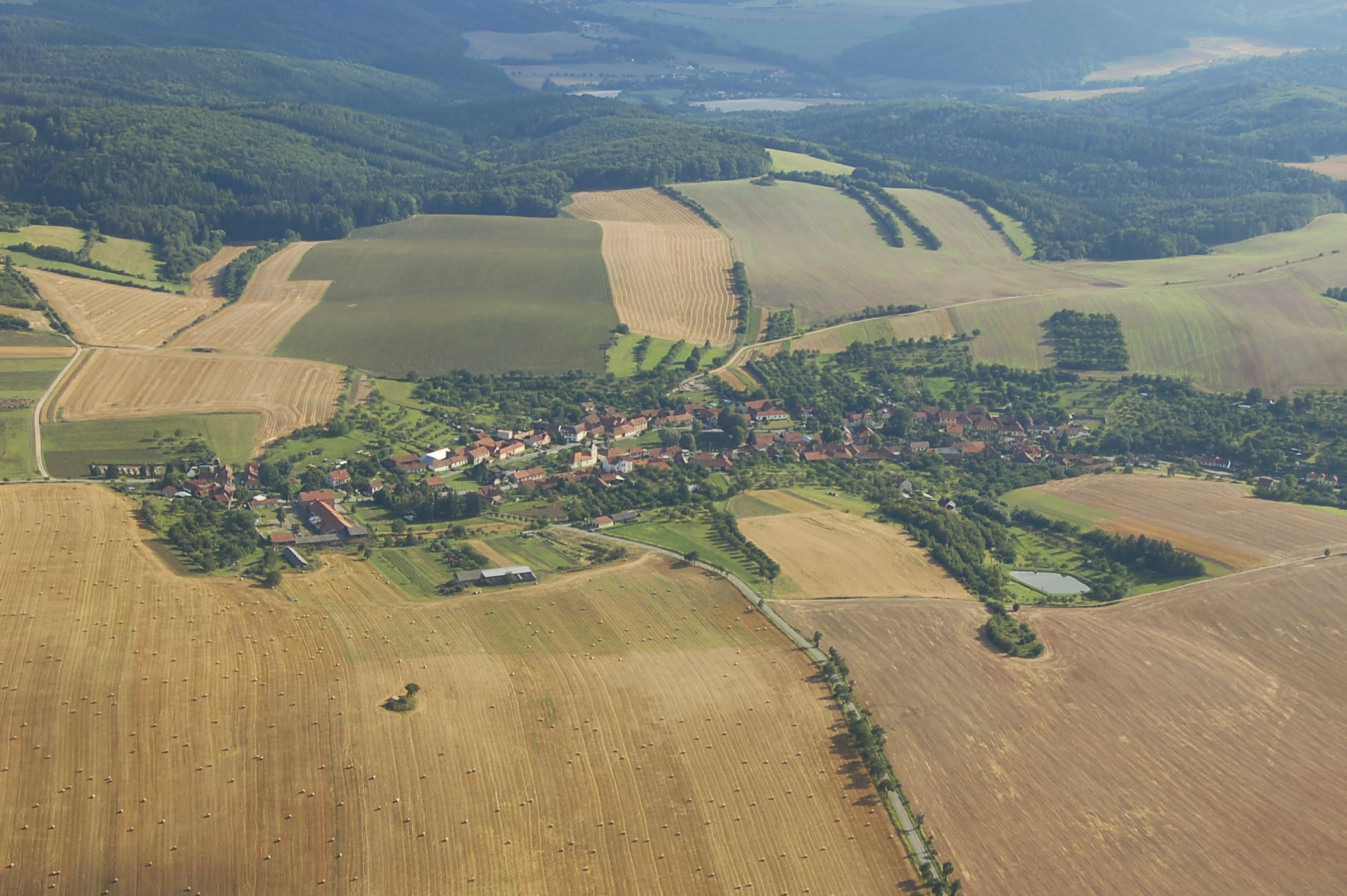 Letecký snímek Rašova (okres Tišnov)